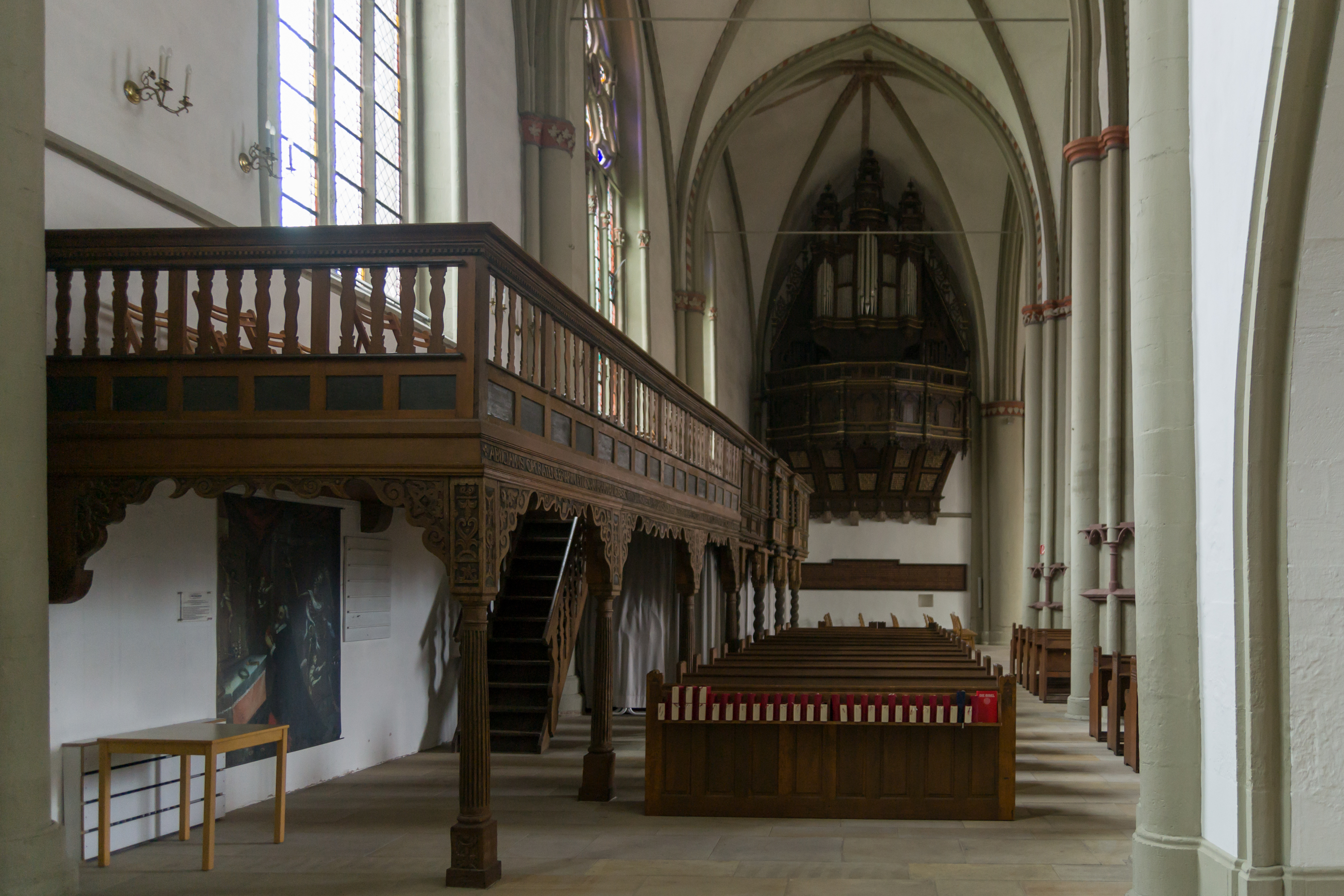 This image shows a heritage building in Germany, located in the North Rhine-Westphalian city Lemgo. Seitenschiff mit Holzempore in der evangelisch-lutherischen Kirche St. Marien in Lemgo